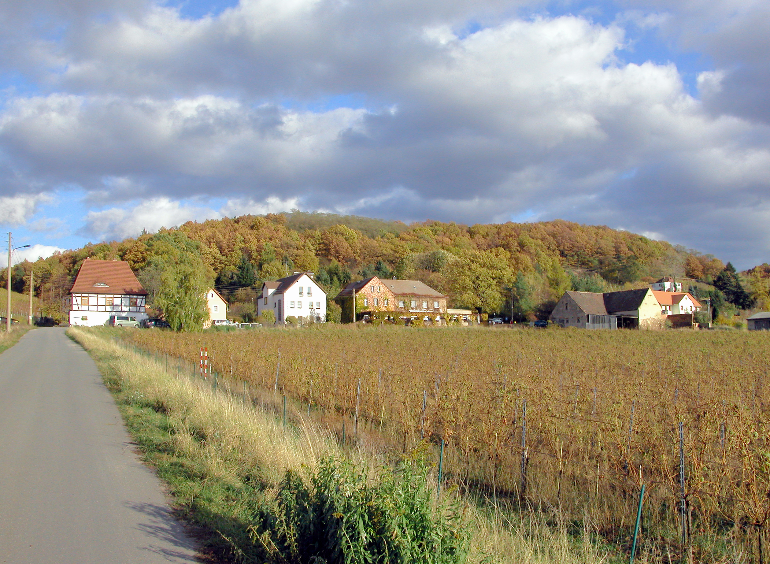 05.11.2009 01640 Neucoswig (Coswig), Am Talkenberger Hof 3 (GMP: 51.130728,13.601025): Weingut Talkenberger Hof (1607). Die Weinberge am Rand des Friedewalds wurden im 16. Jahrhundert angelegt. Unter den Grundbesitzern war auch ein Georg Talkenberg (Jorg Dalchenbergk), der 1595 im Kirchenbuch von Coswig genannt wird. Dieser errichtete 1607 den Talkenberger Hof. Der Weinberg hatte wechselnde Besitzer. Diese wohnten nicht auf dem Talkenberger Hof, sondern nutzten ihn als Sommerhaus. 1647 war der Weinberg im Besitz des Moritzburger Amtsschössers Simon Heymann, 1665 erwarb ihn die Witwe des kurfürstlichen Sekretärs Christian Reichbrodt, der als Freiherr von Schrenkendorff in den Adelstand aufgestiegen war. 1960 vereinigten sich drei Neucoswiger Gärtnereien zur Gärtnerischen Produktionsgenossenschaft "Am Talkenberger Hof". Seit den 1970er Jahren wurden die alten Weinberge wieder aufgerebt. Im Weinberghaus, das nach 1994 denkmalgerecht restauriert wurde, befinden sich Wohnungen. [DSCN40038.TIF]20091105480DR.JPG(c)Blobelt